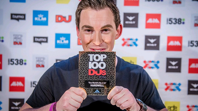 top-1-Hardwell